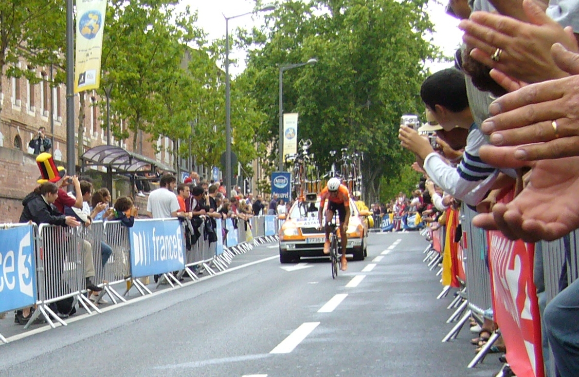 Le courreur cycliste espagnol Mikel Astarloza lors du contre la montre d'Albi du Tour de France 2007 Mikel Astarloza during the 2007 Tour de France TT in Albi.